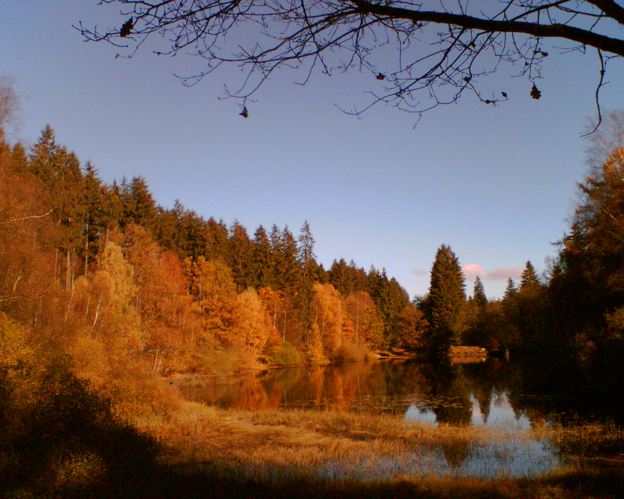 Teich im Solling: Neuer Teich